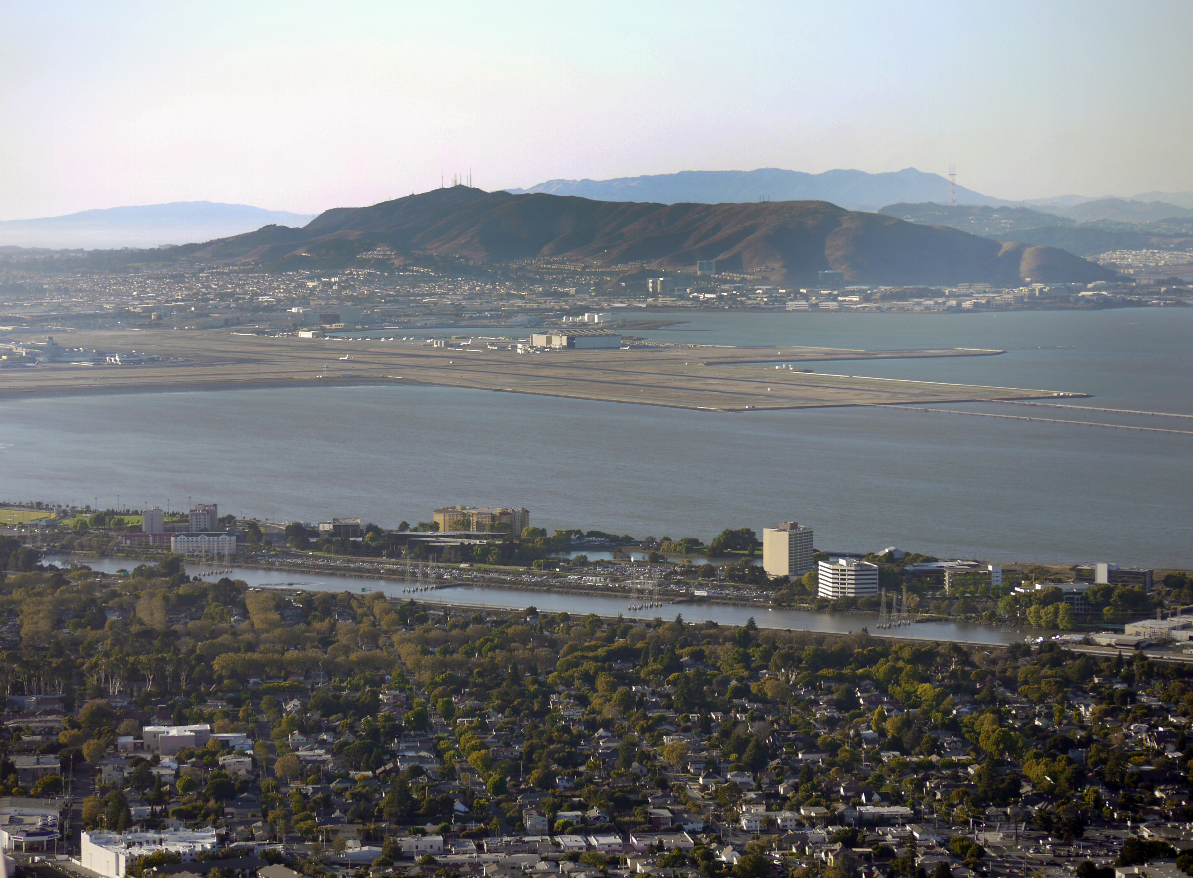 zeppelin-ride-020100925-131